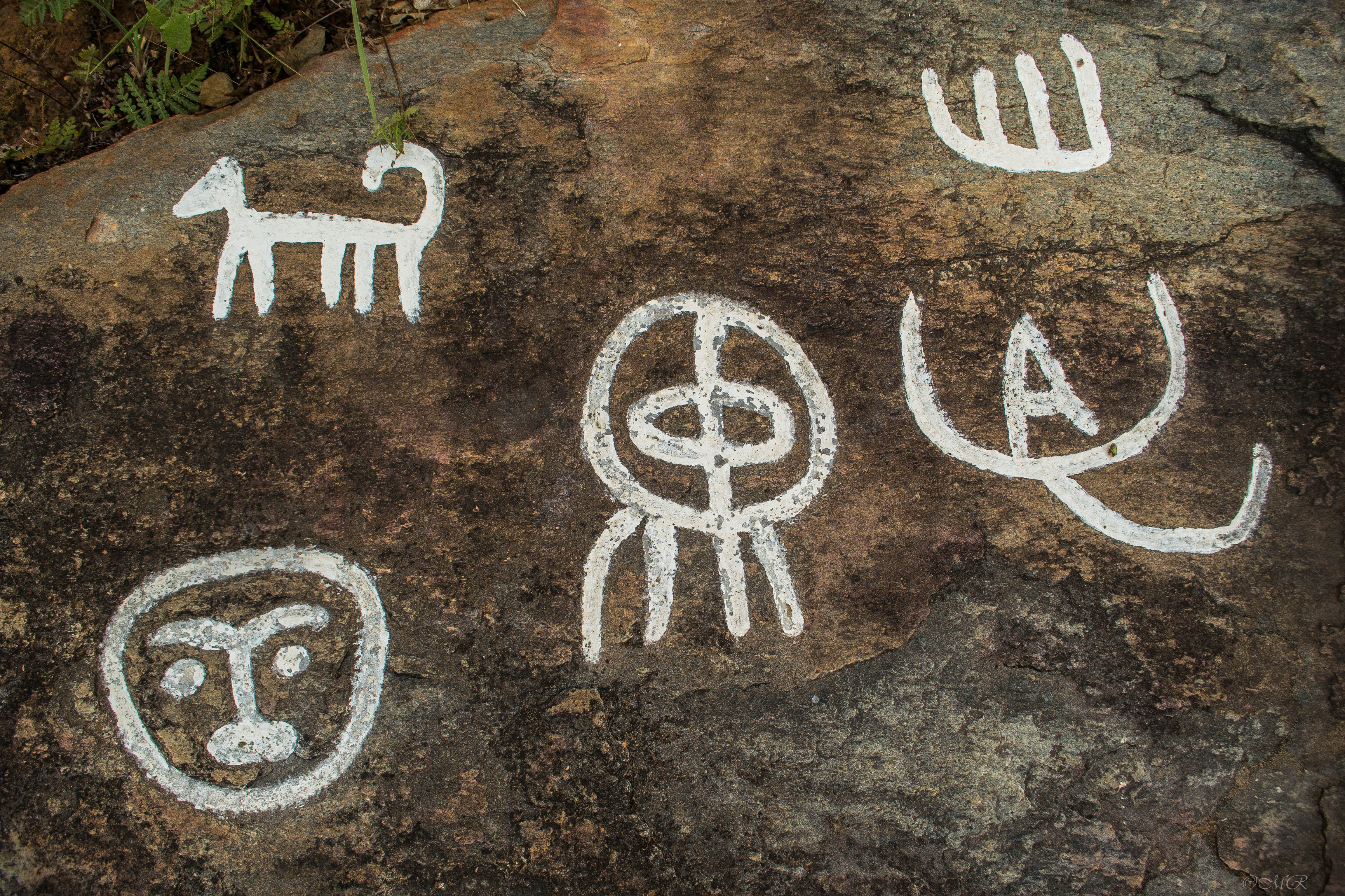 La Cumaca, Complejo De Petroglifos